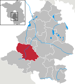 Jüterbog in Brandenburg (Country) - District Teltow-Fläming